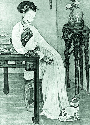 Noble Consort Yi